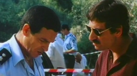 אלון אבוטבול וזאב שימשוני בסרט אהבה מדרגה ראשונה